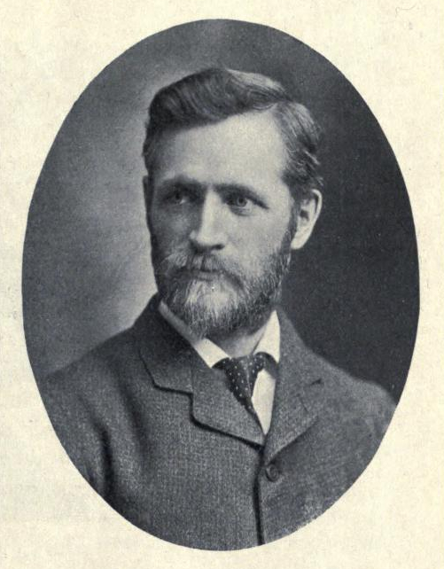 William Edwin Saunders